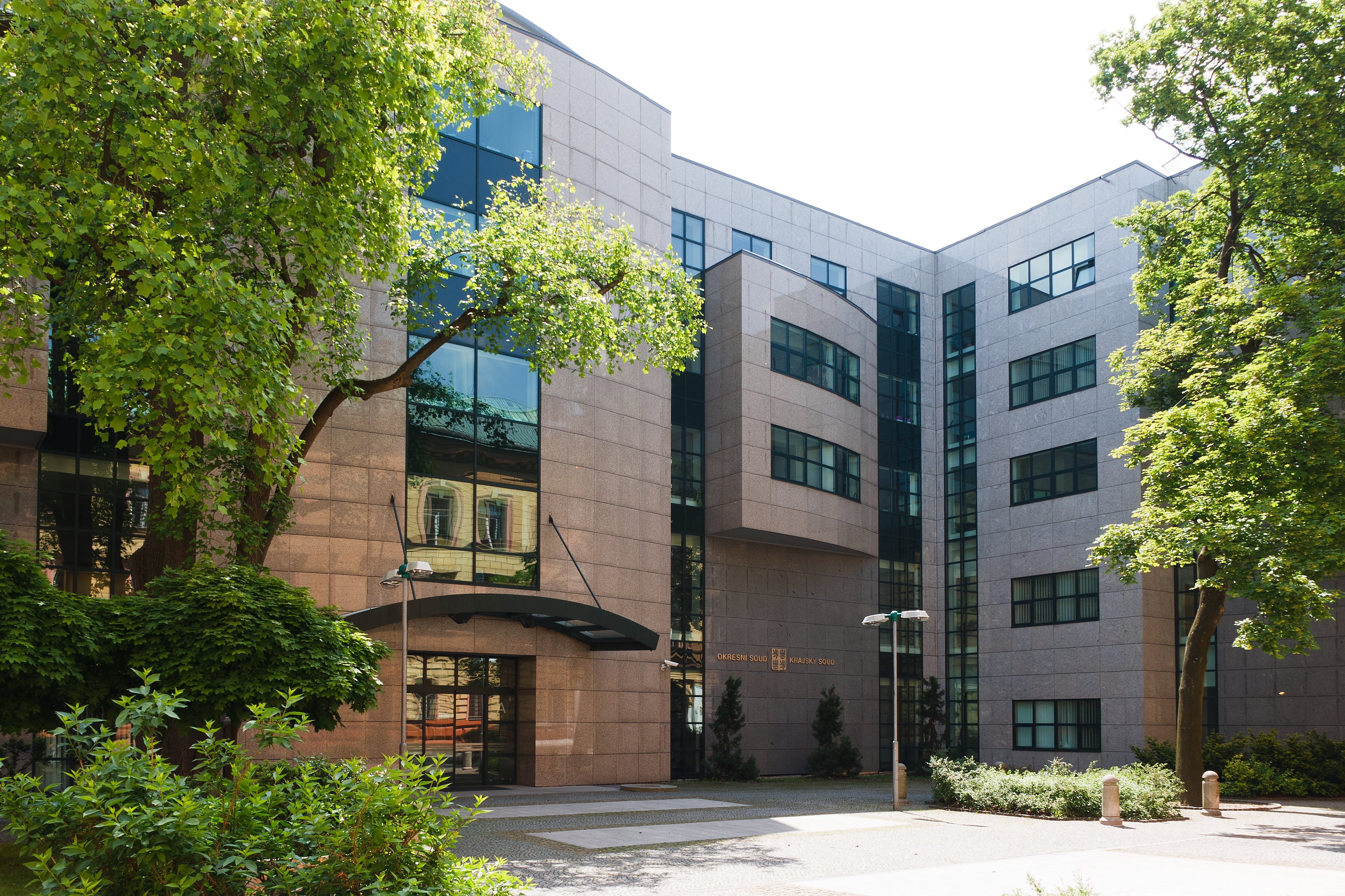 Budova Okresního soudu v Liberci, severovýchodní pohled